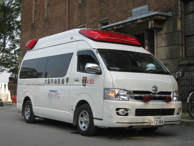 大阪市消防局 中央救急隊